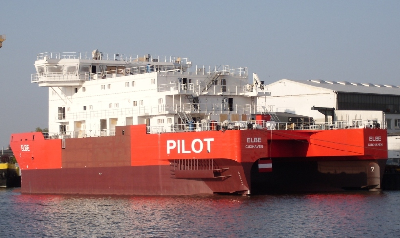 Lotsenstationsschiff Elbe (II) in der Ausrüstung